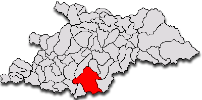 Categorie:Hărţi ale judeţului Maramureş